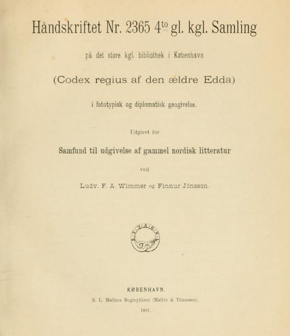 Titelbladet fra Codex regius af den aeldre Edda) i fotypisk og diplomatisk gengivelse Udgivet for Samfund til udgivelse af gammel nordisk litteratur af Ludv. F.A. Wimmer og Finnur Jónsson, 1891